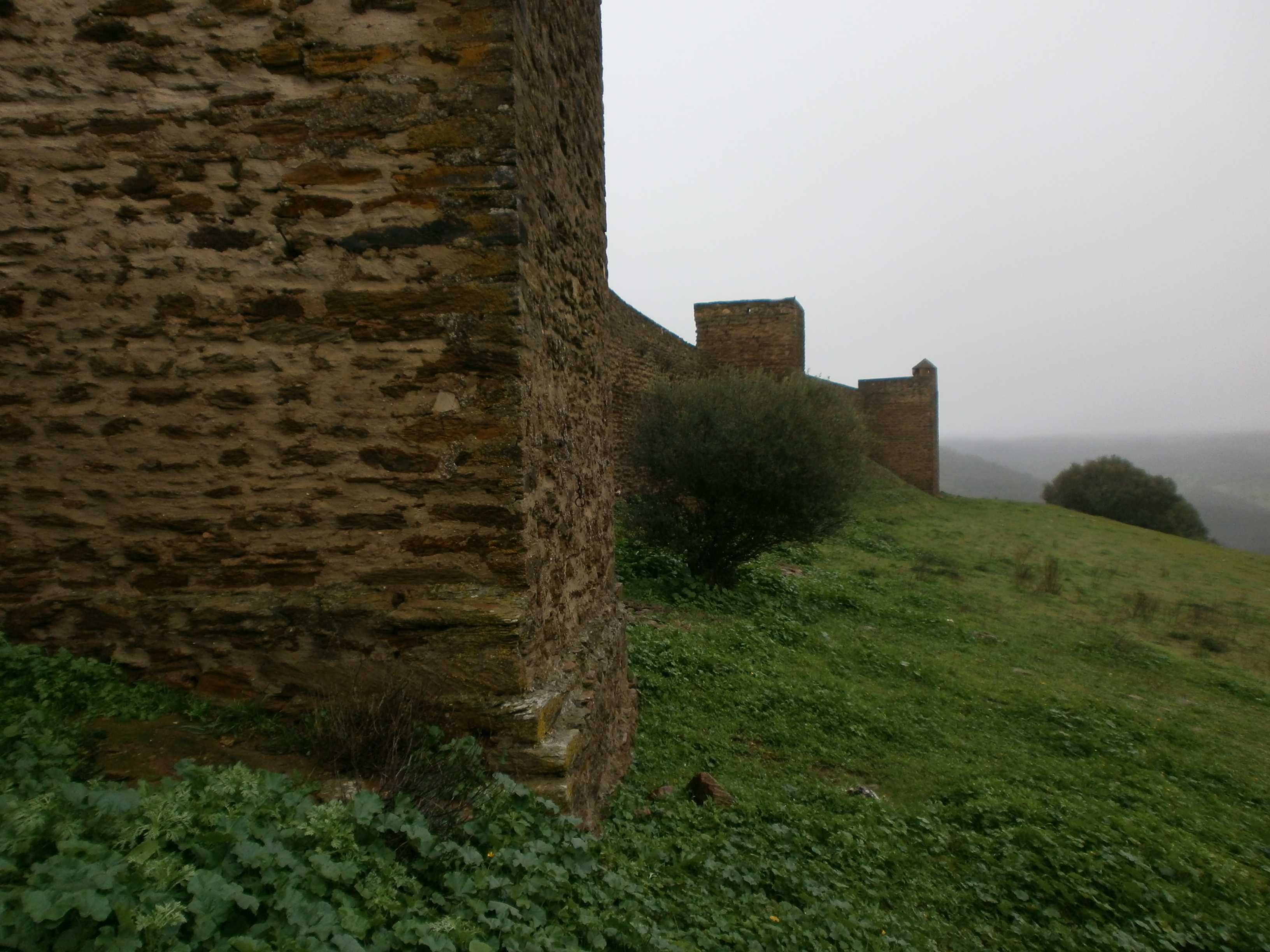 Castelo de Noudar - muralha e torres.